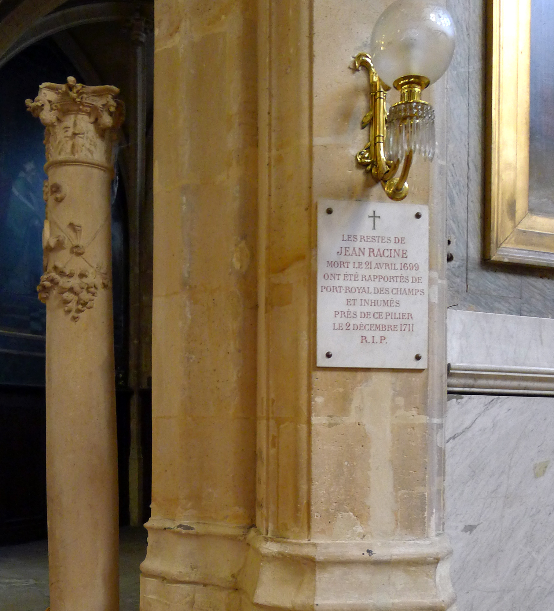 Église Saint-Étienne-du-Mont (plaque indiquant le transferts des restes de Jean Racine) - Paris V